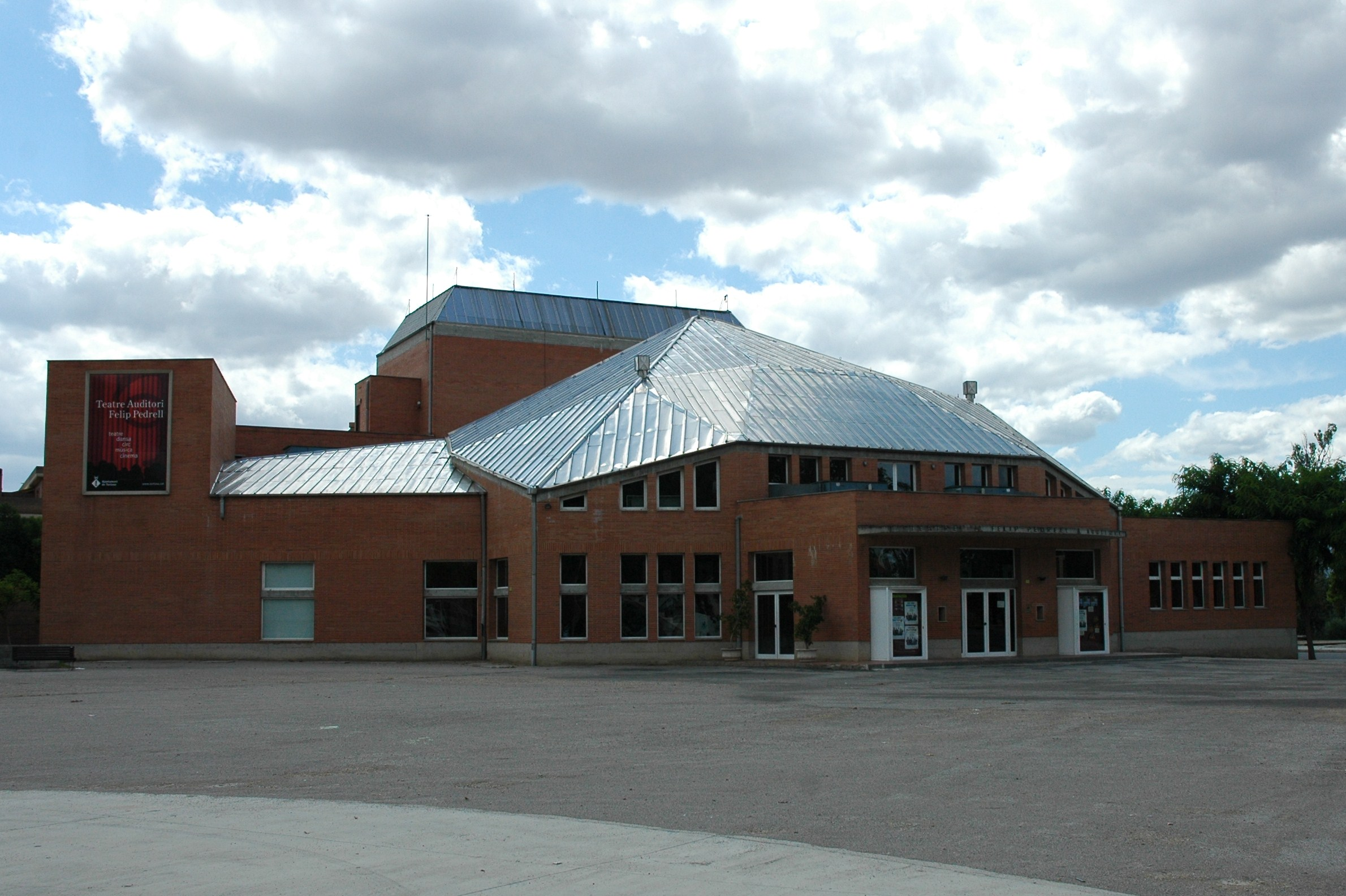 Teatre Auditori Felip Pedrell a Tortosa